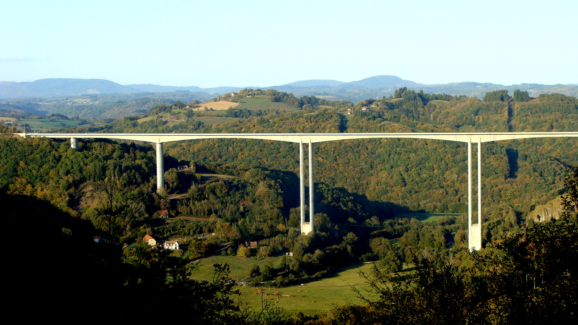 Viaduc des Angles A 89 - Naves, Corrèze, France